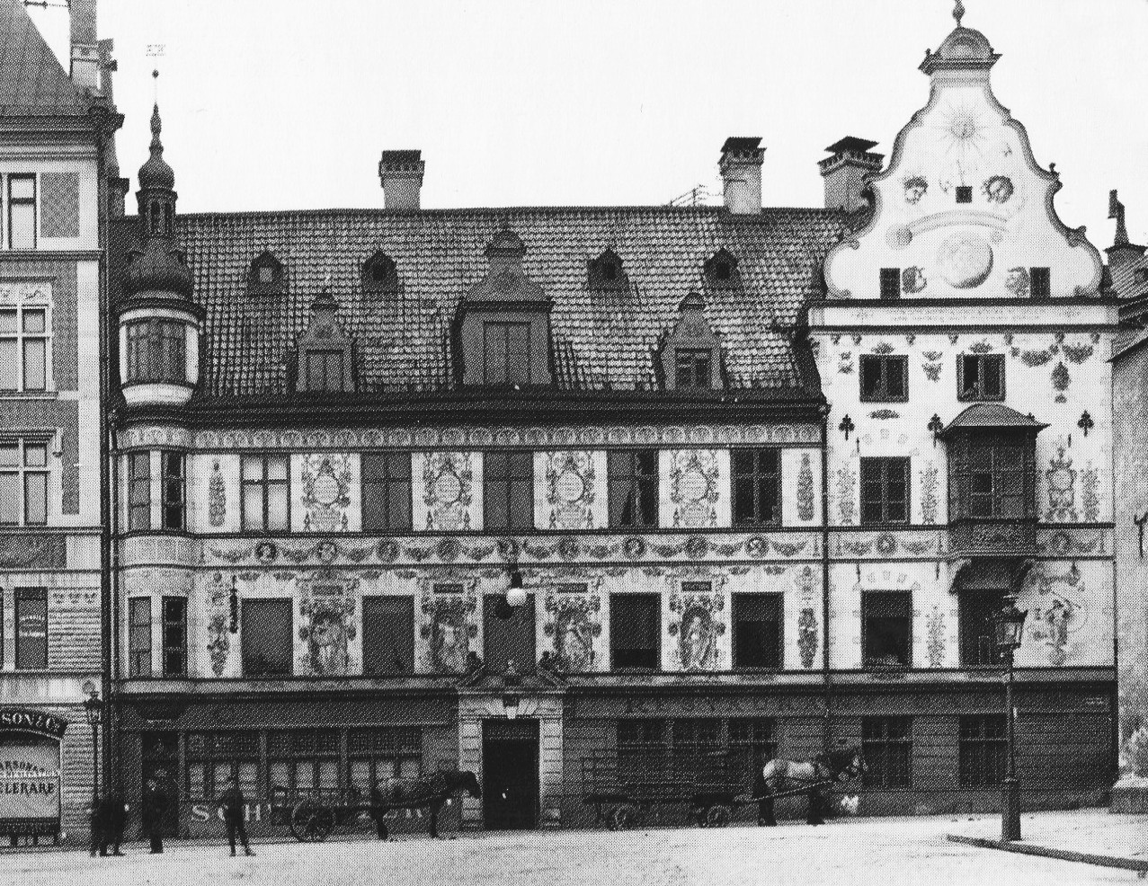 Gamla Kastenhofhuset vid Gustav Adolfs torg. Husets ägare Rudolf Wall (DN:s grundare) lät 1889 Fredrik Lilijekvist rita ett ombyggnadsförslag baserat på Gripsholms borggårdsfasader. I bottenvåningen inrymdes Kastenhofs ölstuga, Huset revs 1892.